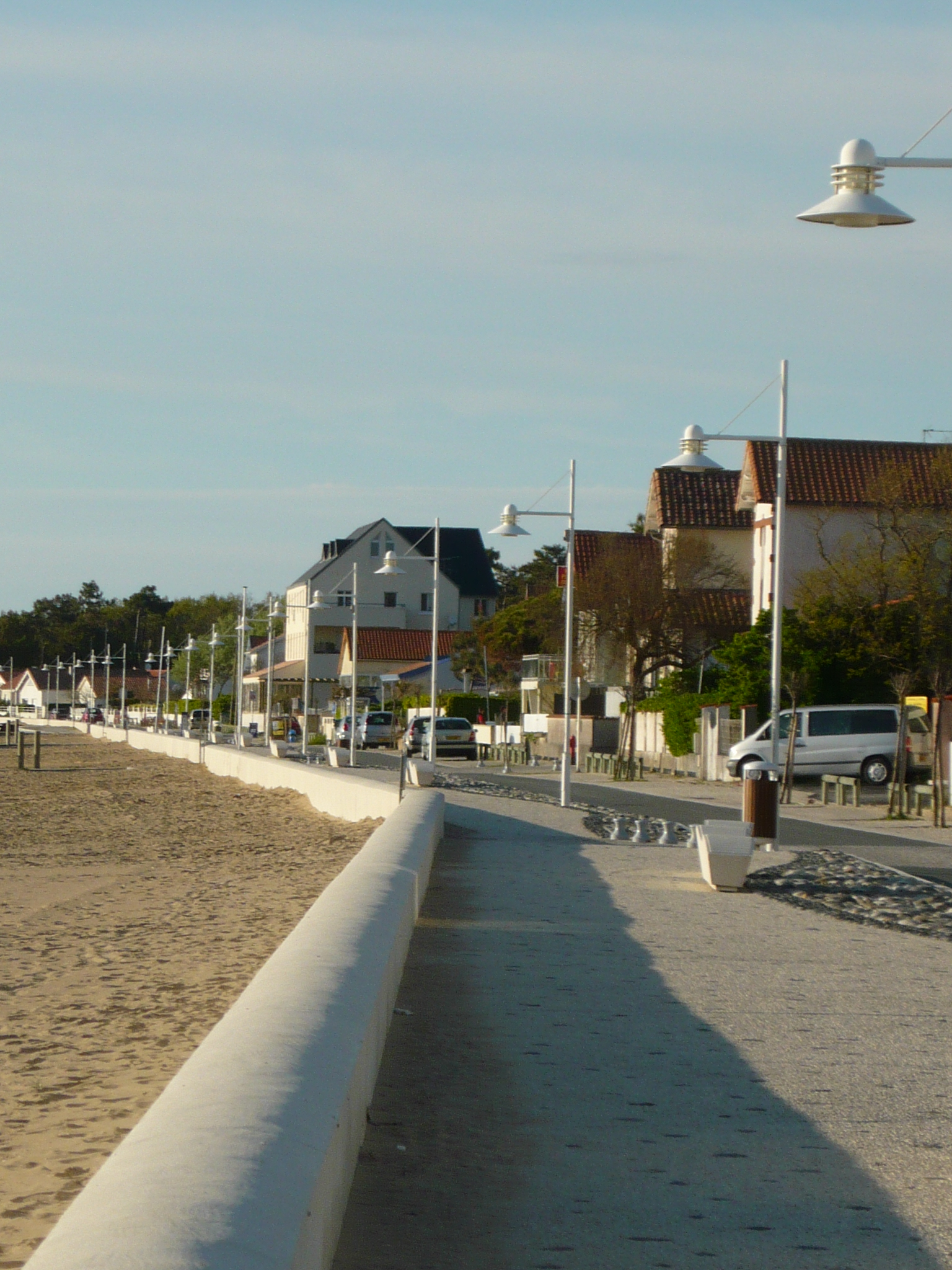 La plage de Marennes un soir d'été (17)